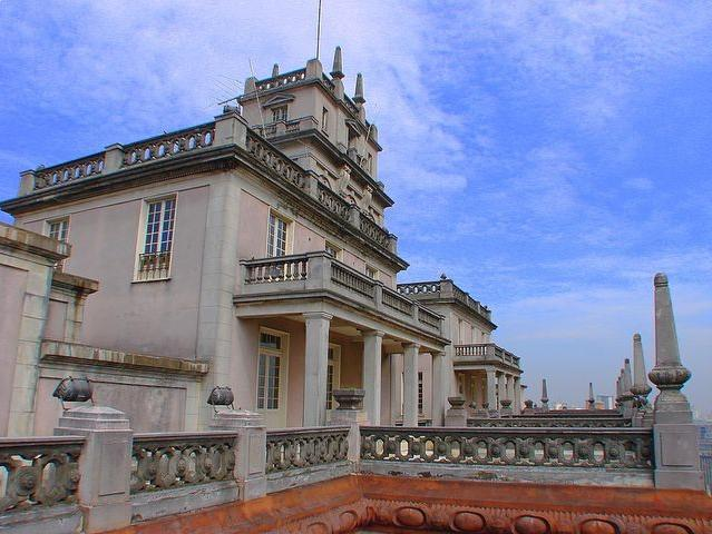 Casa do Comendador, cobertura do Edifício Martinelli em São Paulo, Brasil.